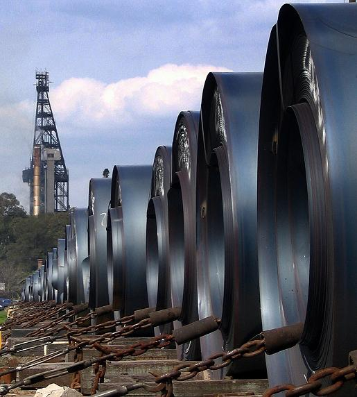 Transporte desde Campana y por ferrocarril de rollos de acero fabricados por Tenaris. Aclaración : Los rollos de acero son fabricados por Ternium (San Nicolás)